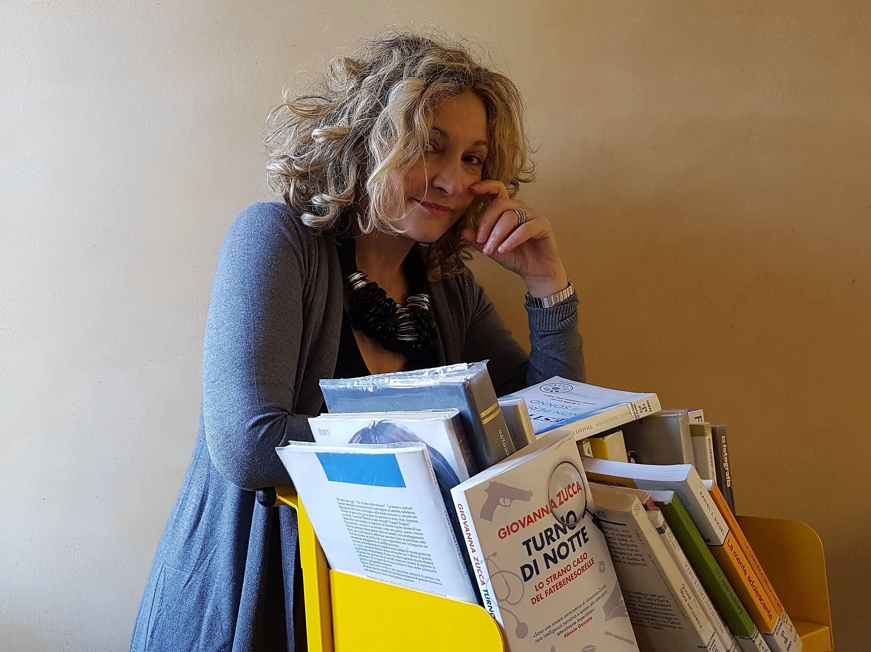 Treviso